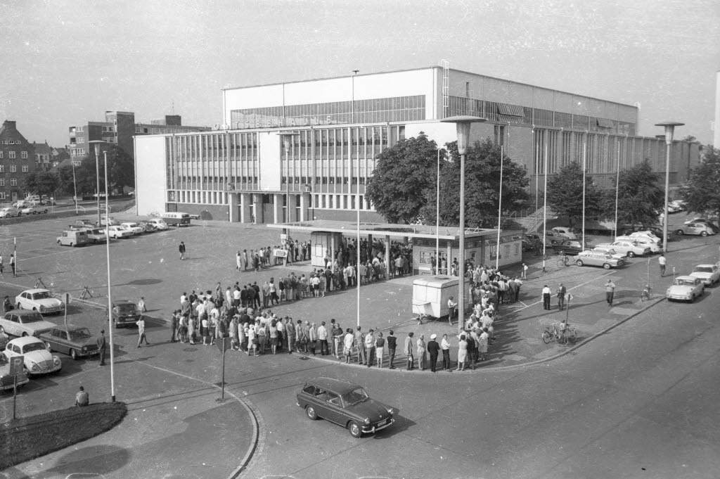 Kartenverkauf für die Aufzeichnung der Fernsehsendung "Der goldene Schuß" in der Ostseehalle